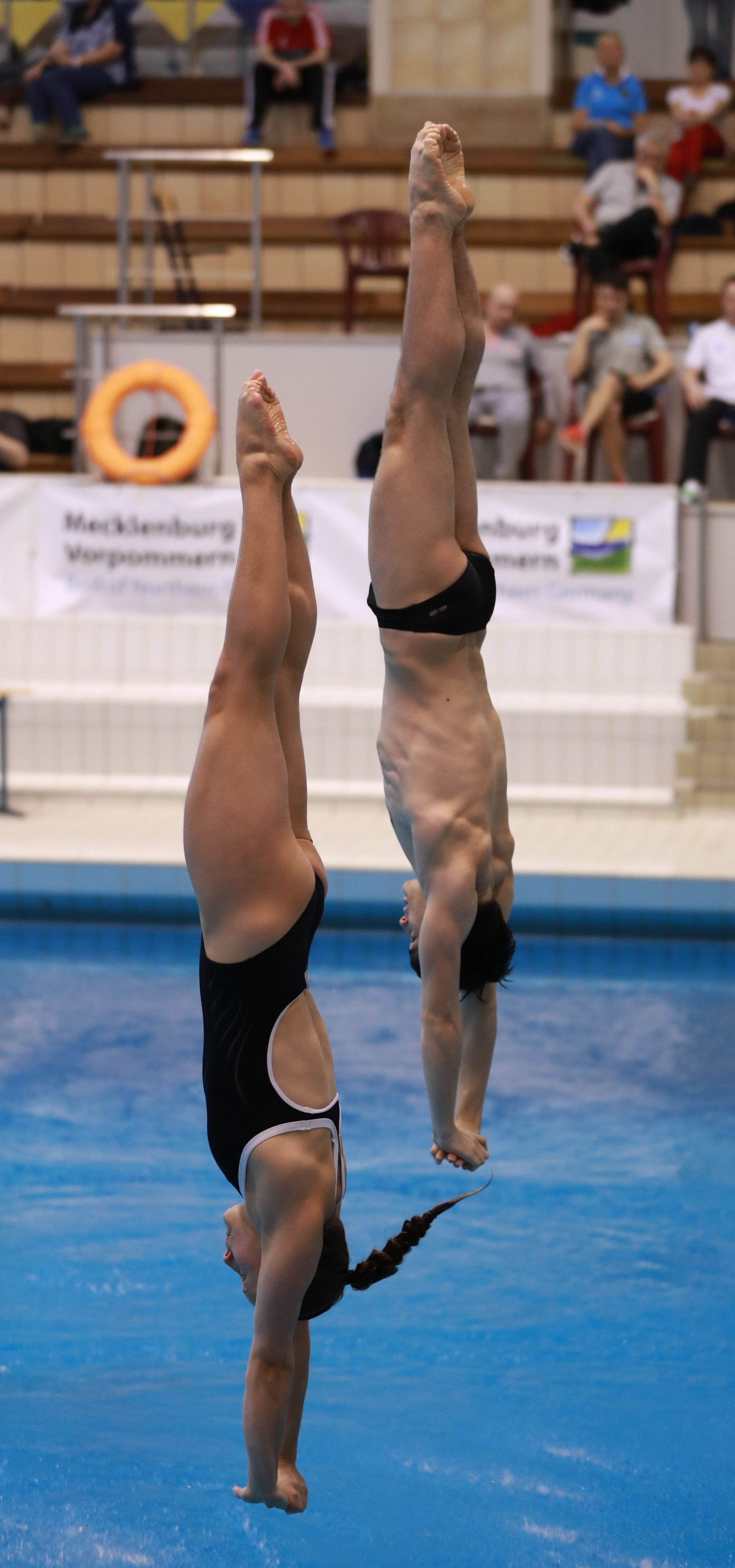 3m mixed Synchron Finale Sprung 1 bei den Internationalen Deutschen Hallenmeisterschaften im Wasserspringen Offene Klassen und Junioren. Abgebildet: Tina Punzel. Lou Massenberg.